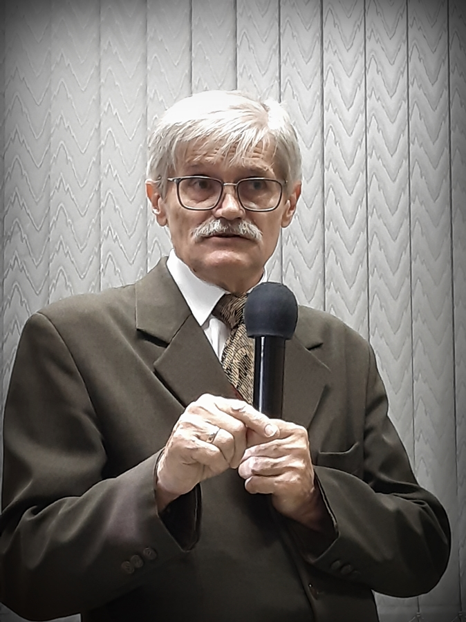 Prof. Idzi Panic, historyk.